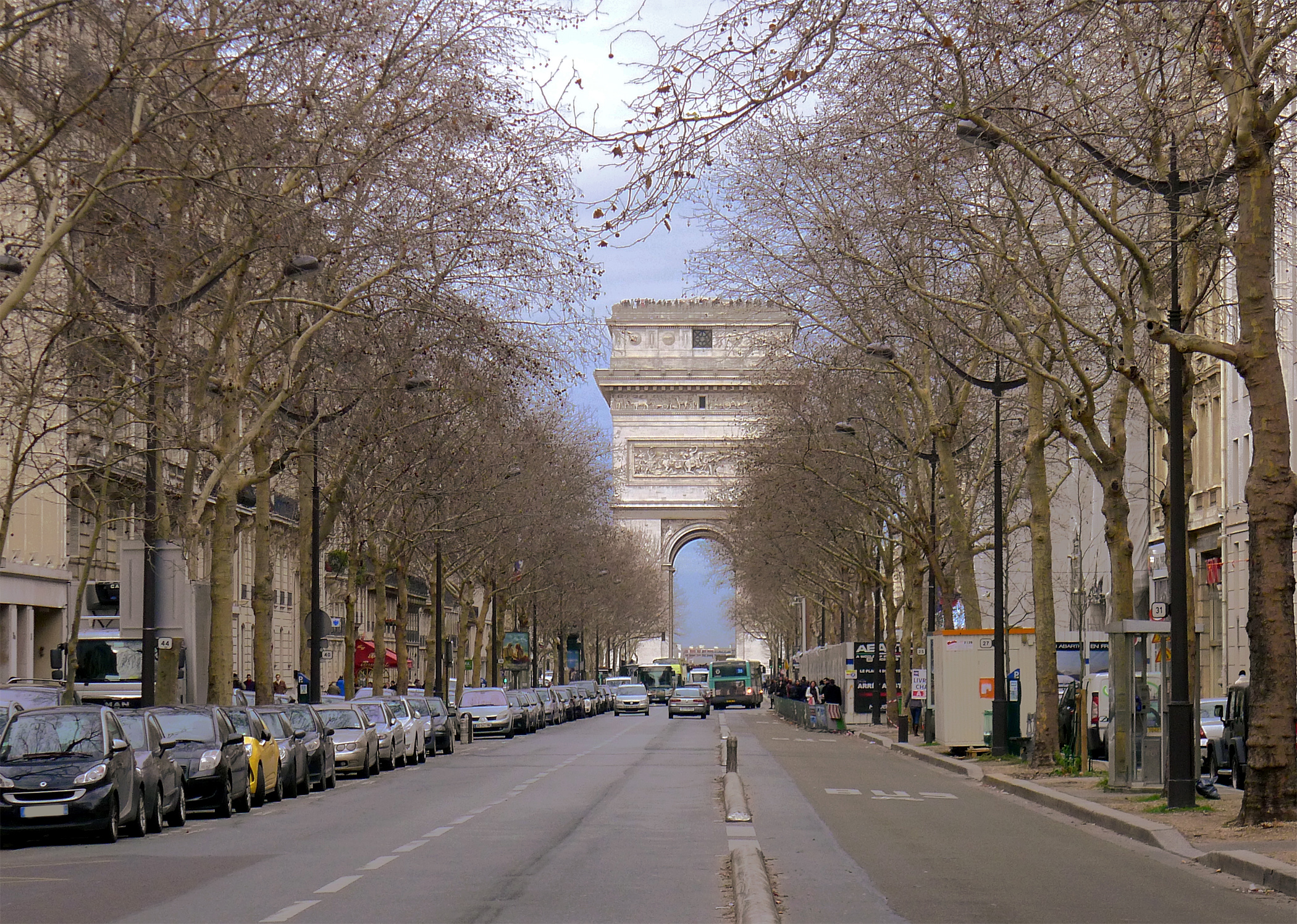 Arbres d'alignement de l'Avenue Kléber, XVIe arrondissement, Paris, France.